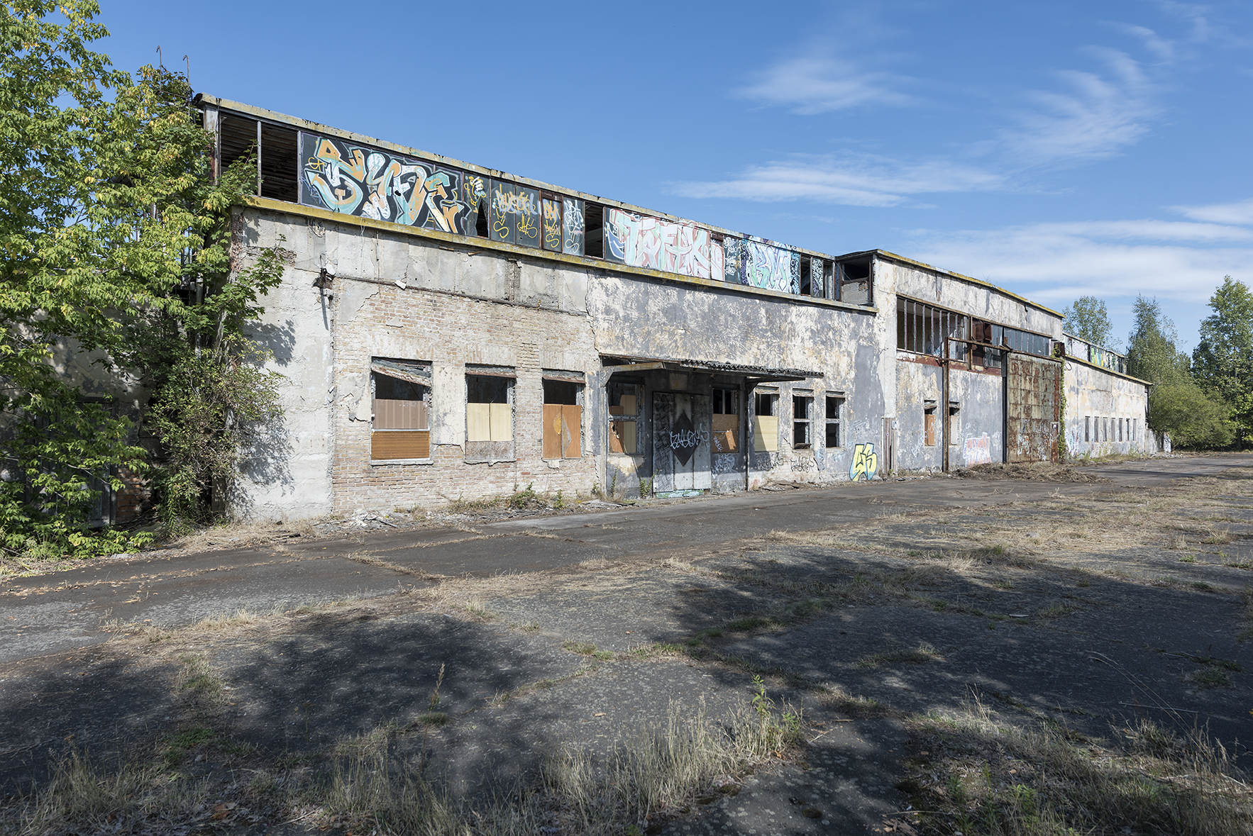 Flugplatz Rangsdorf, Südfassade der ehem. Hauptwerkshalle der Bücker Flugzeugbau gegen Nordosten.